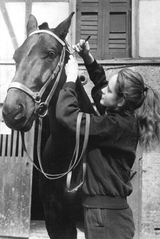 Kohren-Elbisbach, Lehrling in der Freizeit Zentralbild Hoffmann 15.4.1964 Die Freizeit gehört dem Reitsport. Christer Majunke die aus der Großstadt Leipzig stammt, ist Lehrling im 1. Ausbildungsjahr des Volksgutes Kohren-Eibisbach, Bezirk Leipzig. Ihre größte Freude ist es, wenn sie in ihrer Freizeit den Reitsport pflegen kann (unser Bild).